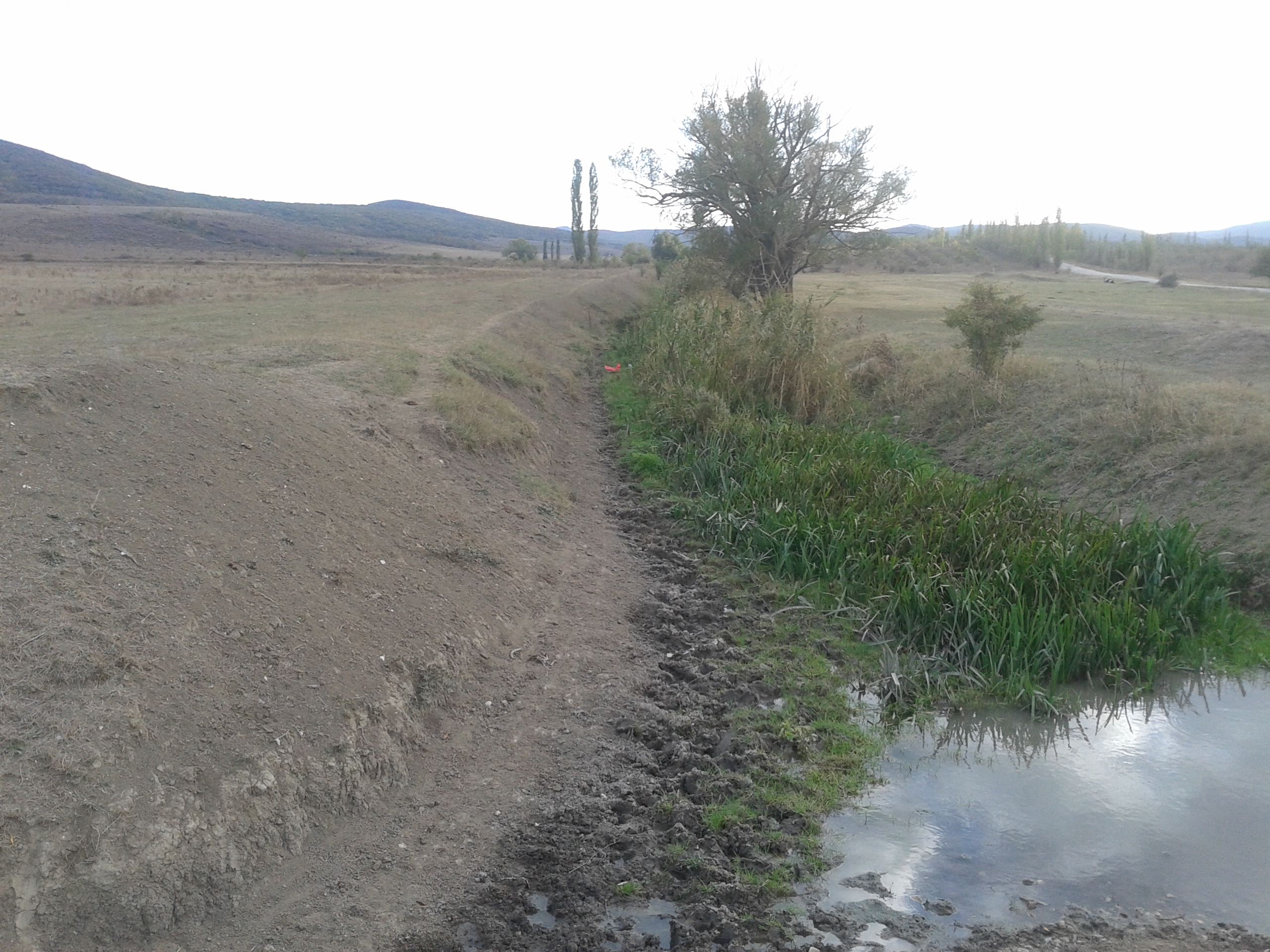 Река Салы у села Холодовка, Крым.